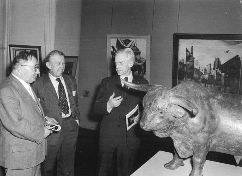 Berlin, ADK-Ausstellung, Schwimmer, Radziwill, Drake Zentralbild Ulmer 17.11.1956 Jahresausstellung der Deutschen Akademie der Künste eröffnet Der Präsident der Deutschen Akademie der Künste, Prof. Otto Nagel, eröffnete mit einer festlichen Ansprache im Plenarsaal der Deutschen Akademie der Künste am 17.11.1956 die Jahresausstellung. Als Gäste waren unter anderem erschienen: der Präsident der Volkskammer Dr. h.c. Johannes Dieckmann, der Minister für Volksbildung Fritz Lange und der Sekretär des ZK der SED, Dr. h. c. Paul Waudel. UBz: vlnr: Professor [Max] Schwimmer, der Oldenburger Kunstmaler Radziwill und der Bildhauer Heinrich Drake in der Ausstellung. Abgebildete Personen: Drake, Heinrich Prof.: Bildhauer, DDR Schwimmer, Max Prof.: Maler, Grafiker, Hochschule für Bildende Künste Dresden, DDR (GND 118612247)